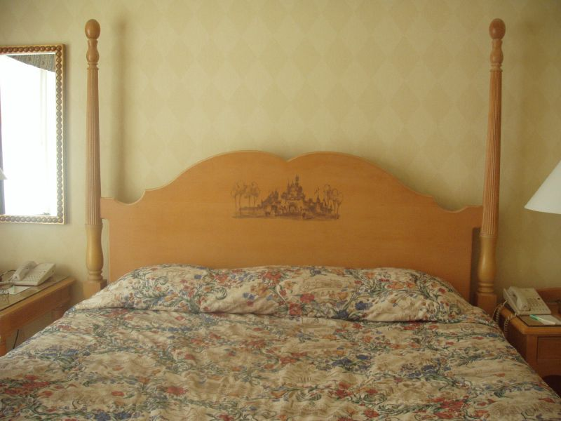 Modern dubbelsäng.Disney Bed